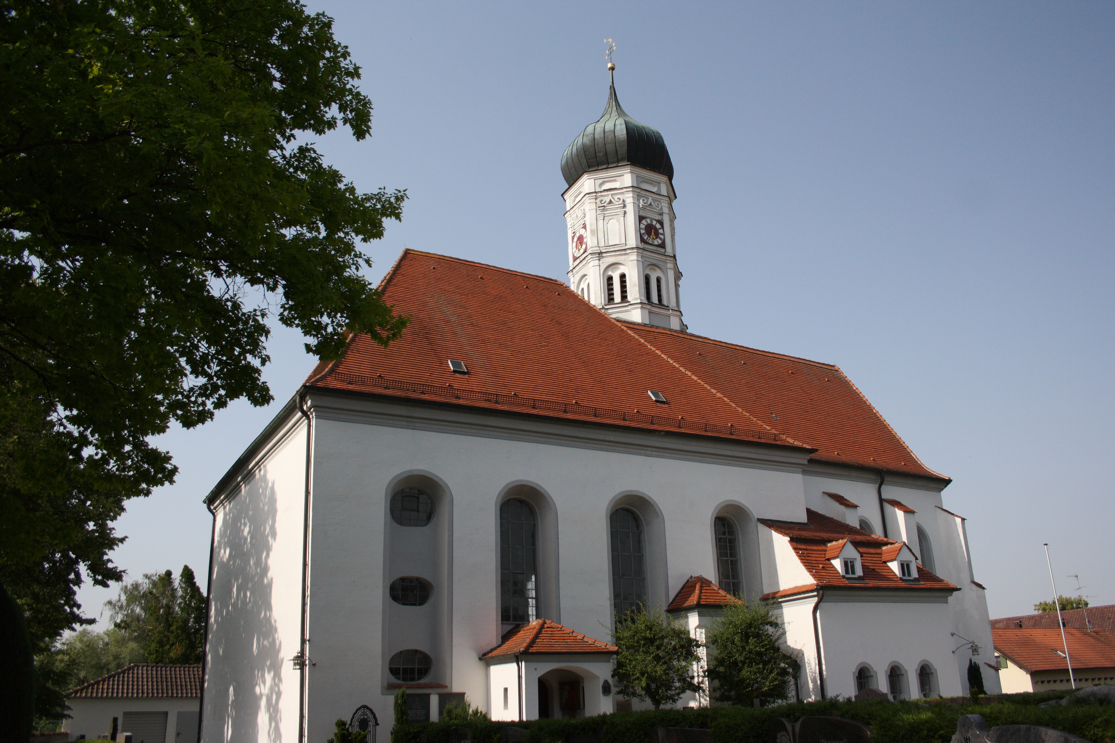 Katholische Pfarrkirche Mariä Himmelfahrt in Ettenbeuren, einem Ortsteil der Gemeinde Kammeltal im Landkreis Günzburg (Bayern), 1764/66 Umbau durch Joseph Dossenberger d.J.